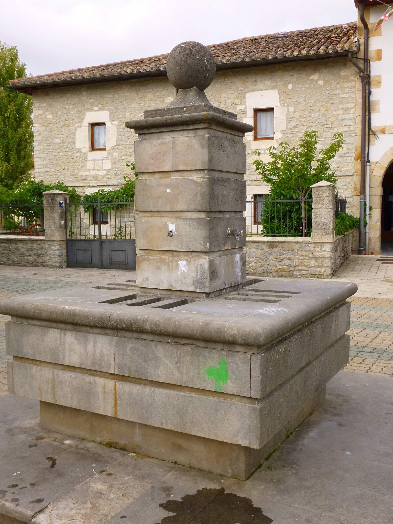 Herriko Plaza de Alegría Dulantzi (Álava)